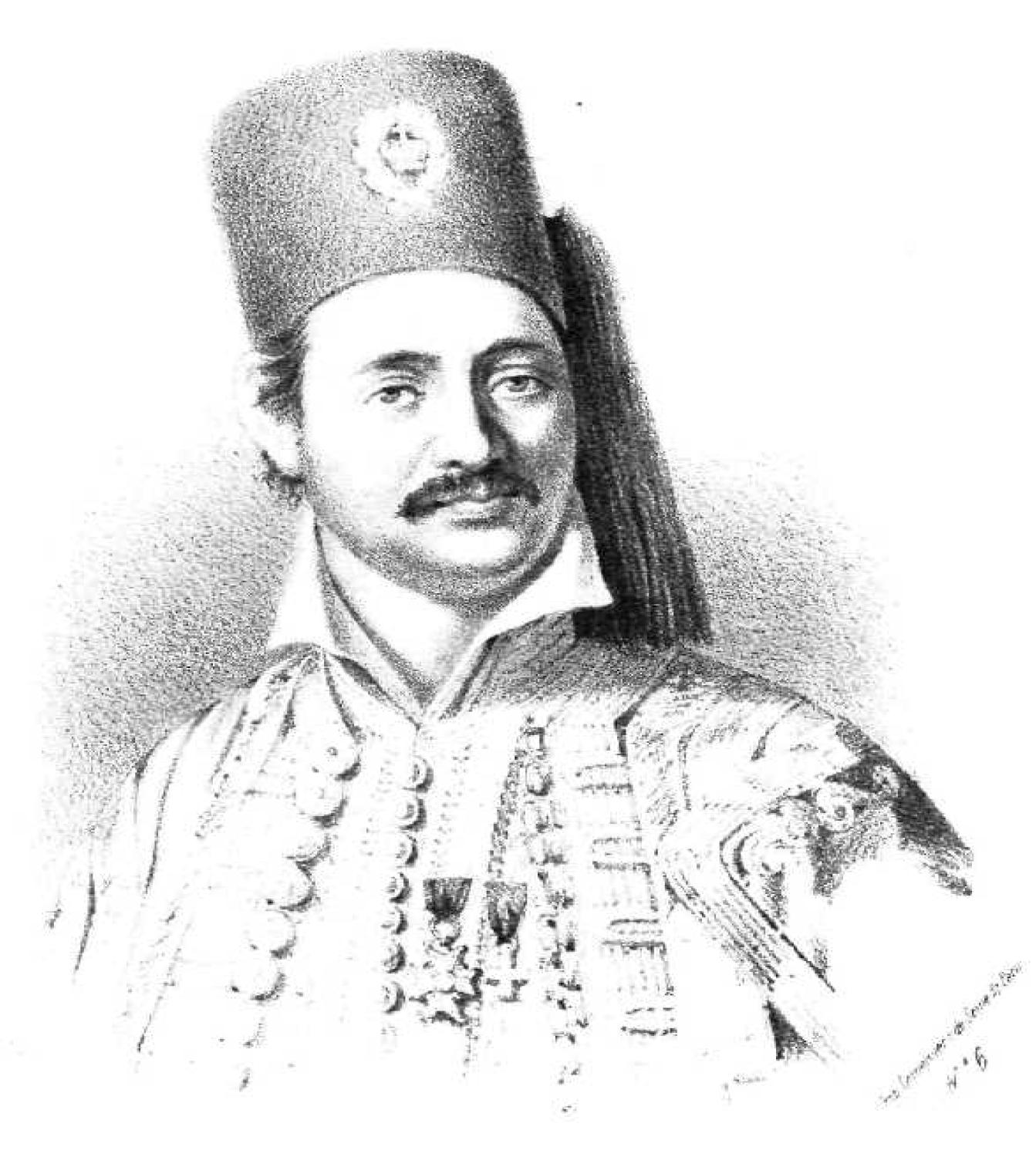 Griechischer Freiheitskämpfer, 19. Jahrhundert